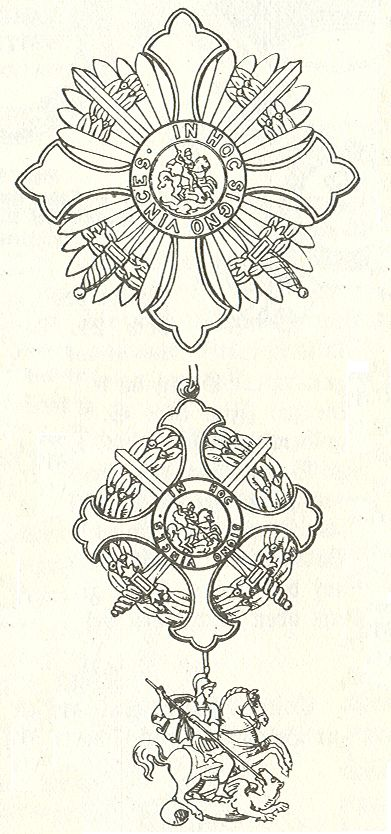 Militaire_Orde_van_Sint-Joris_van_de_Wedervereniging, Napels 1808